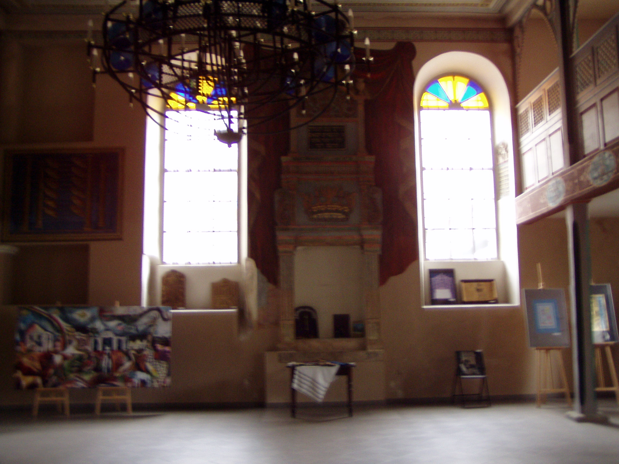 Synagoga Kupa w Krakowie Author: Wikipedysta:Birczanin